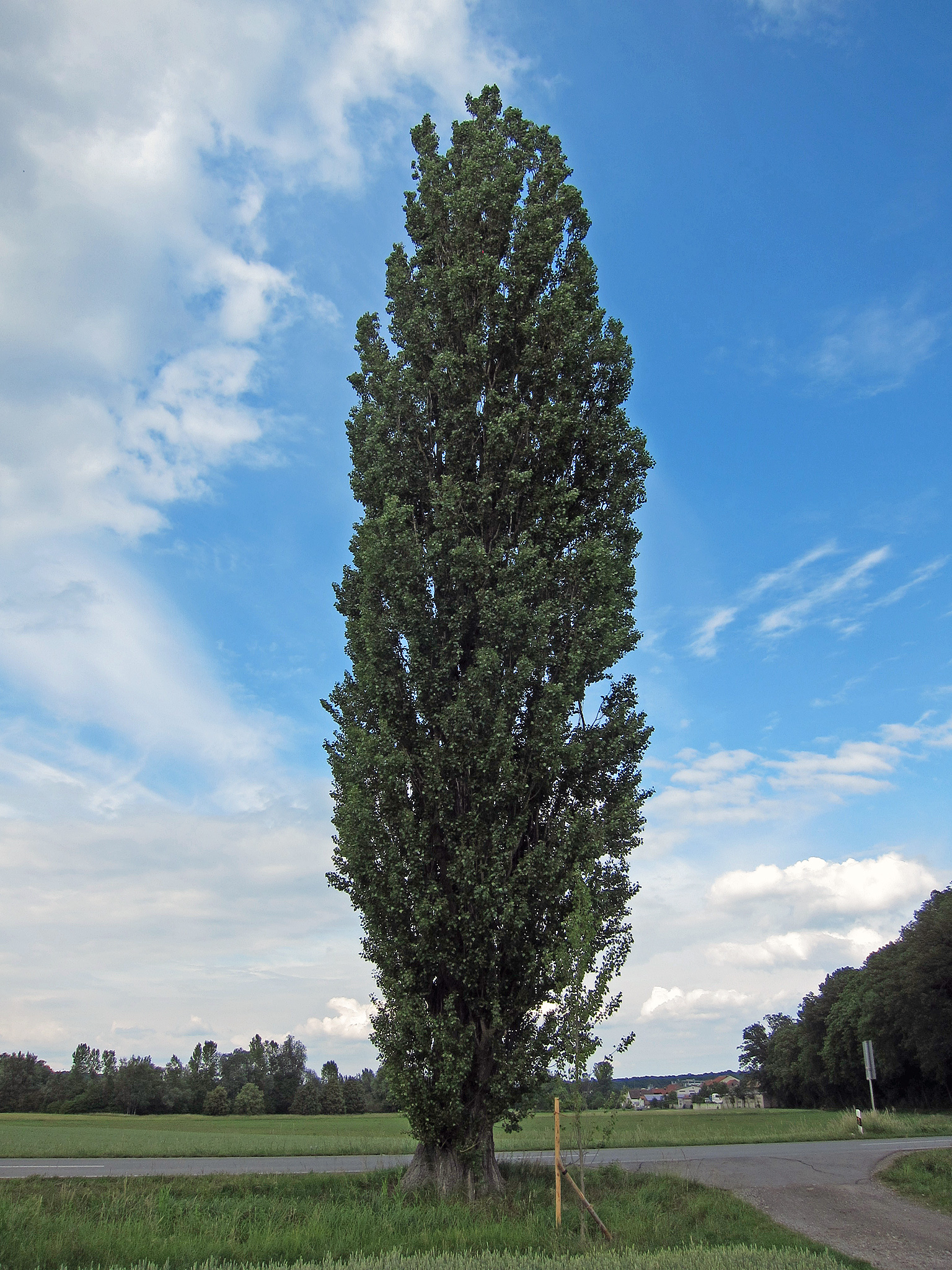 Pappel Wonfurt